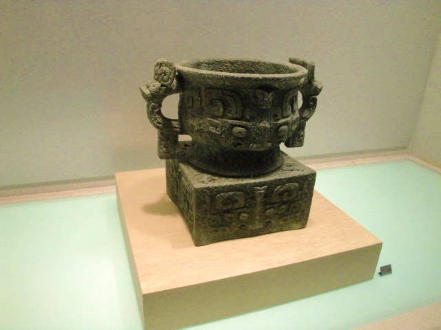 利簋